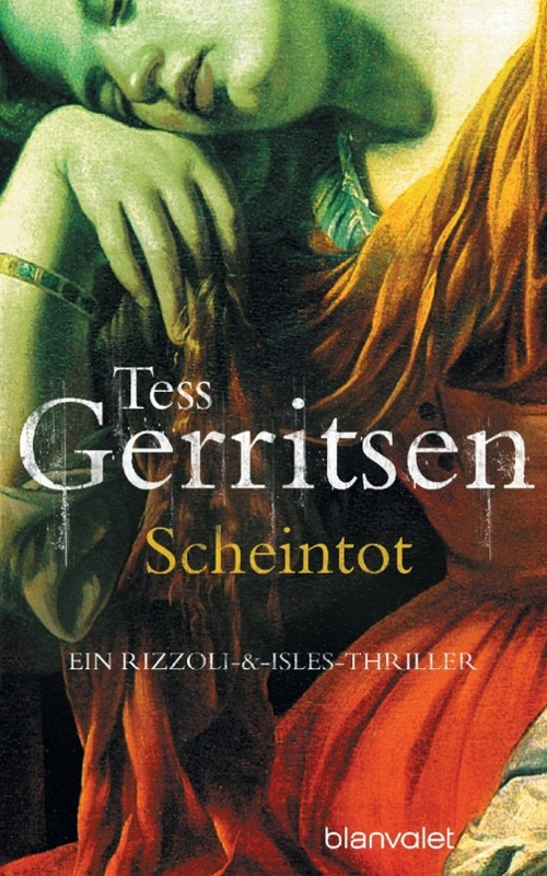 Tess Gerritsen: Scheintot. Blanvalet, München 2008. DNB; Ausschnitt aus Artemisia Gentileschi: Die reuige Magdalena